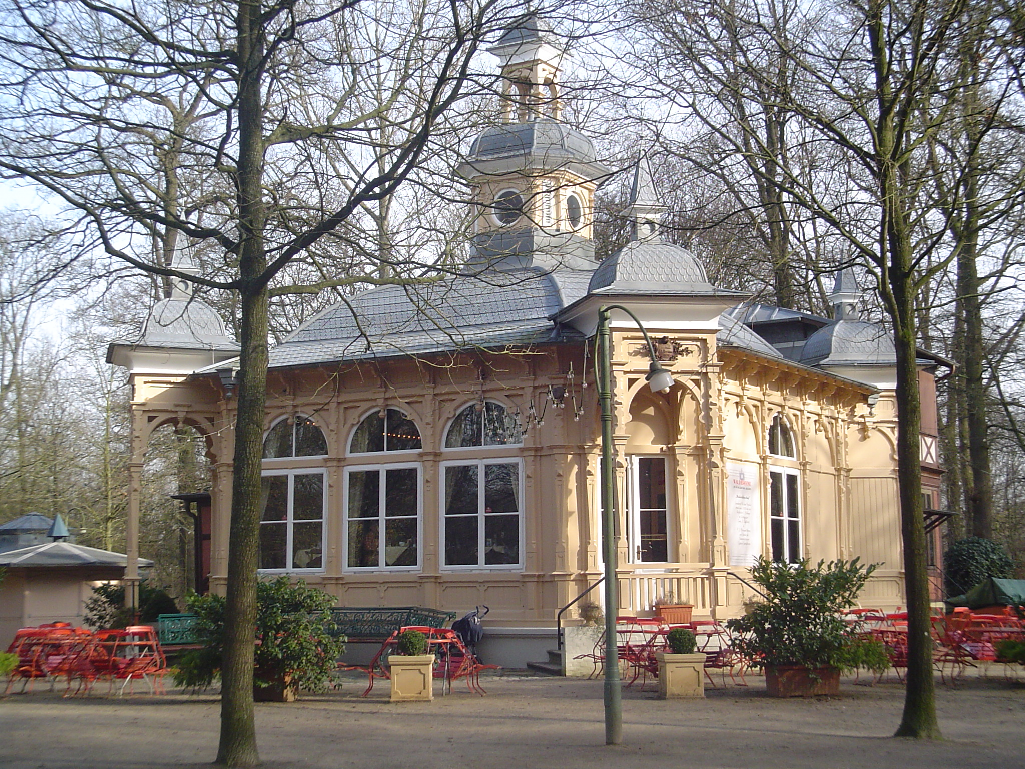 Die Waldbühne im Bürgerpark in Bremen Das abgebildete Objekt ist ein geschütztes Kulturdenkmal in der Freien Hansestadt Bremen, mit der Nr. 0218,T008 beim Landesamt für Denkmalpflege registriert.